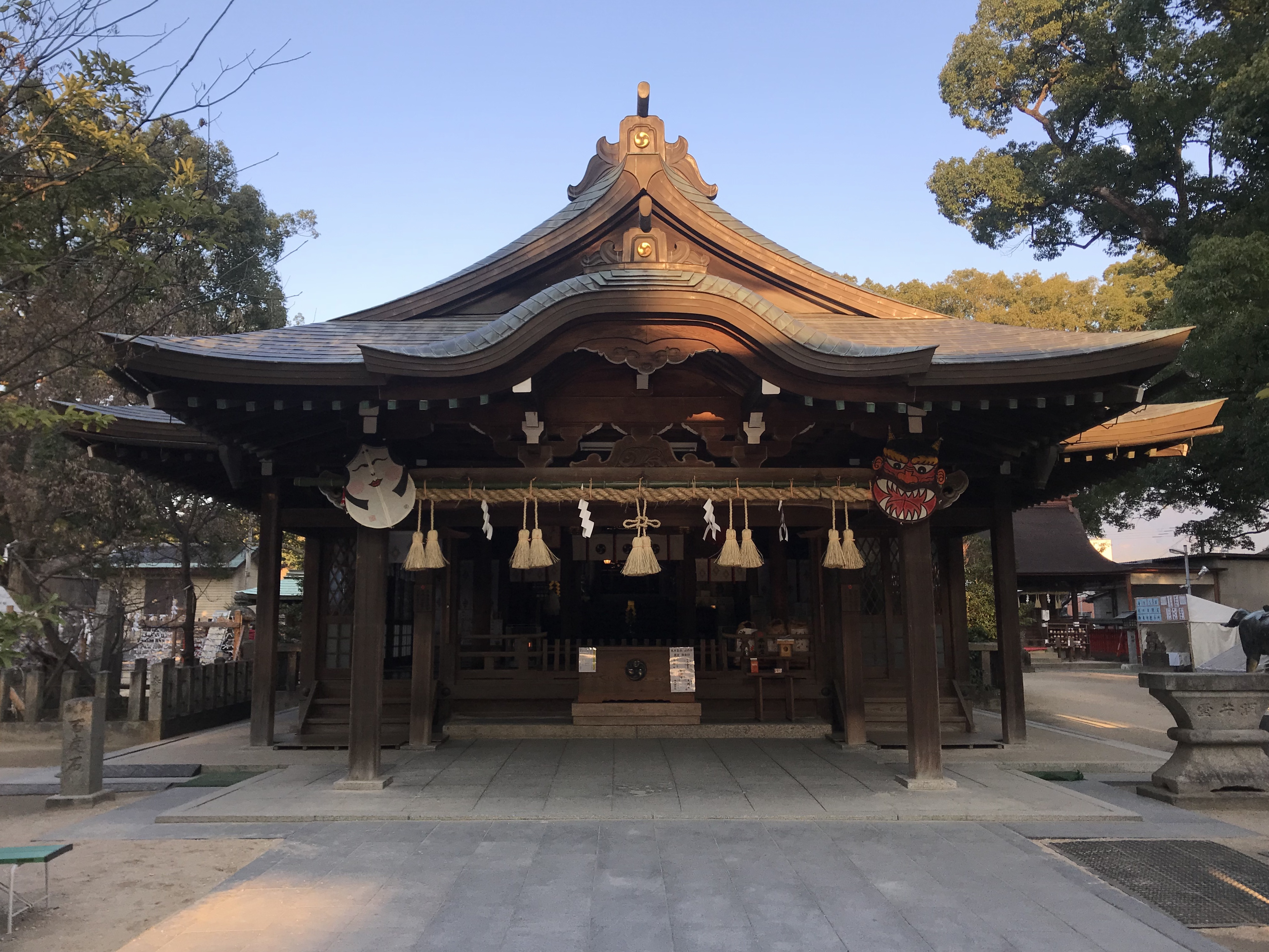 宇美八幡宮の拝殿